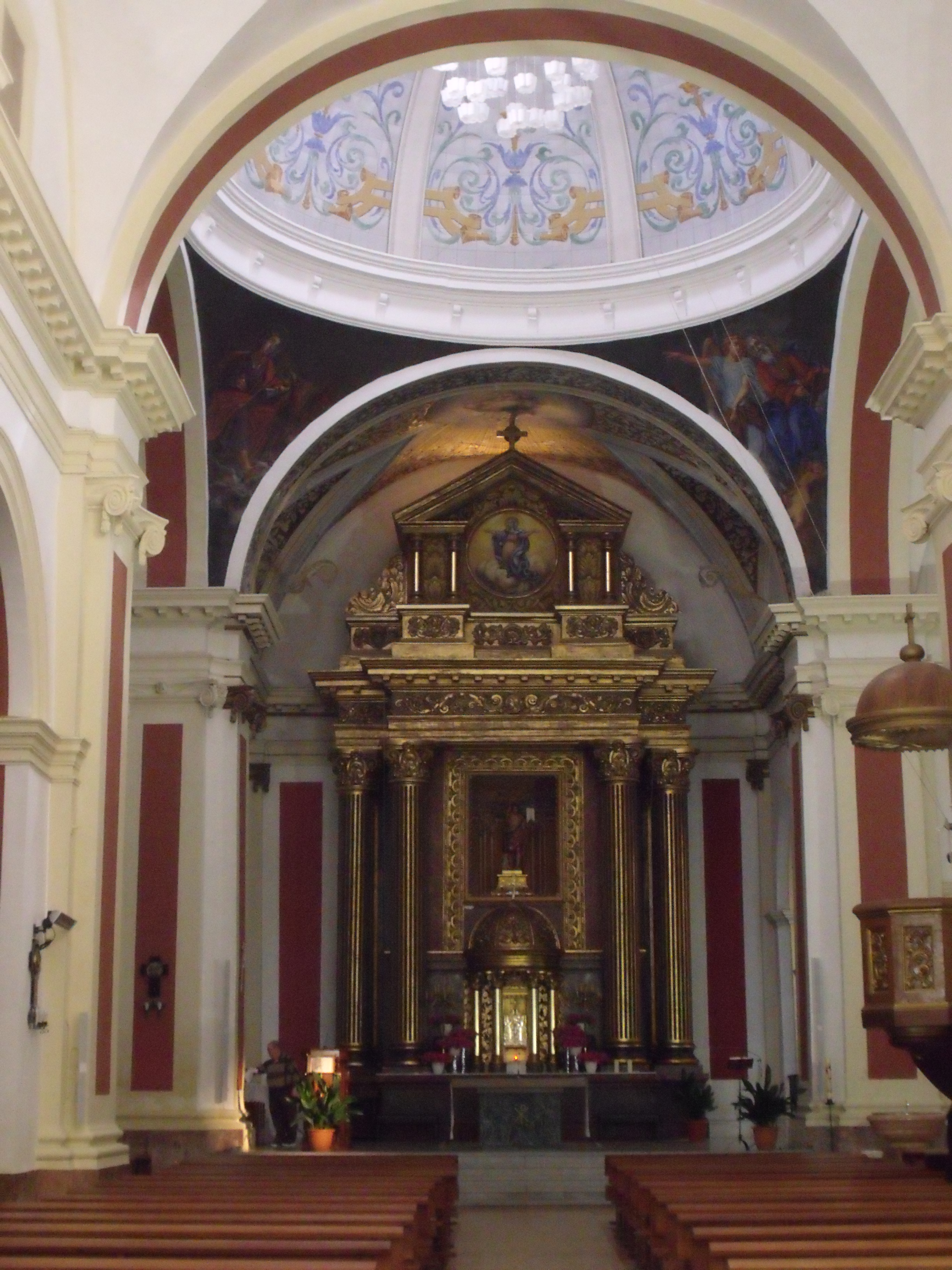 Interior de la Iglesia Parroquial de Casas Ibáñez